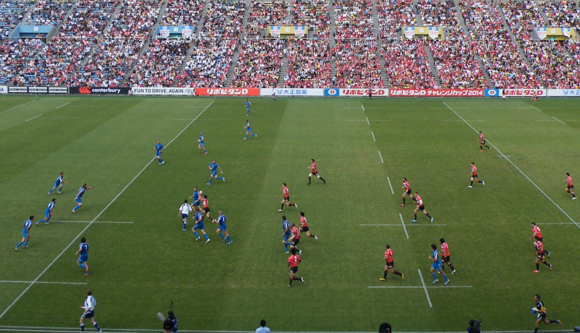 リポビタンDチャレンジカップ2014 日本対イタリア（東京・秩父宮ラグビー場）の試合風景